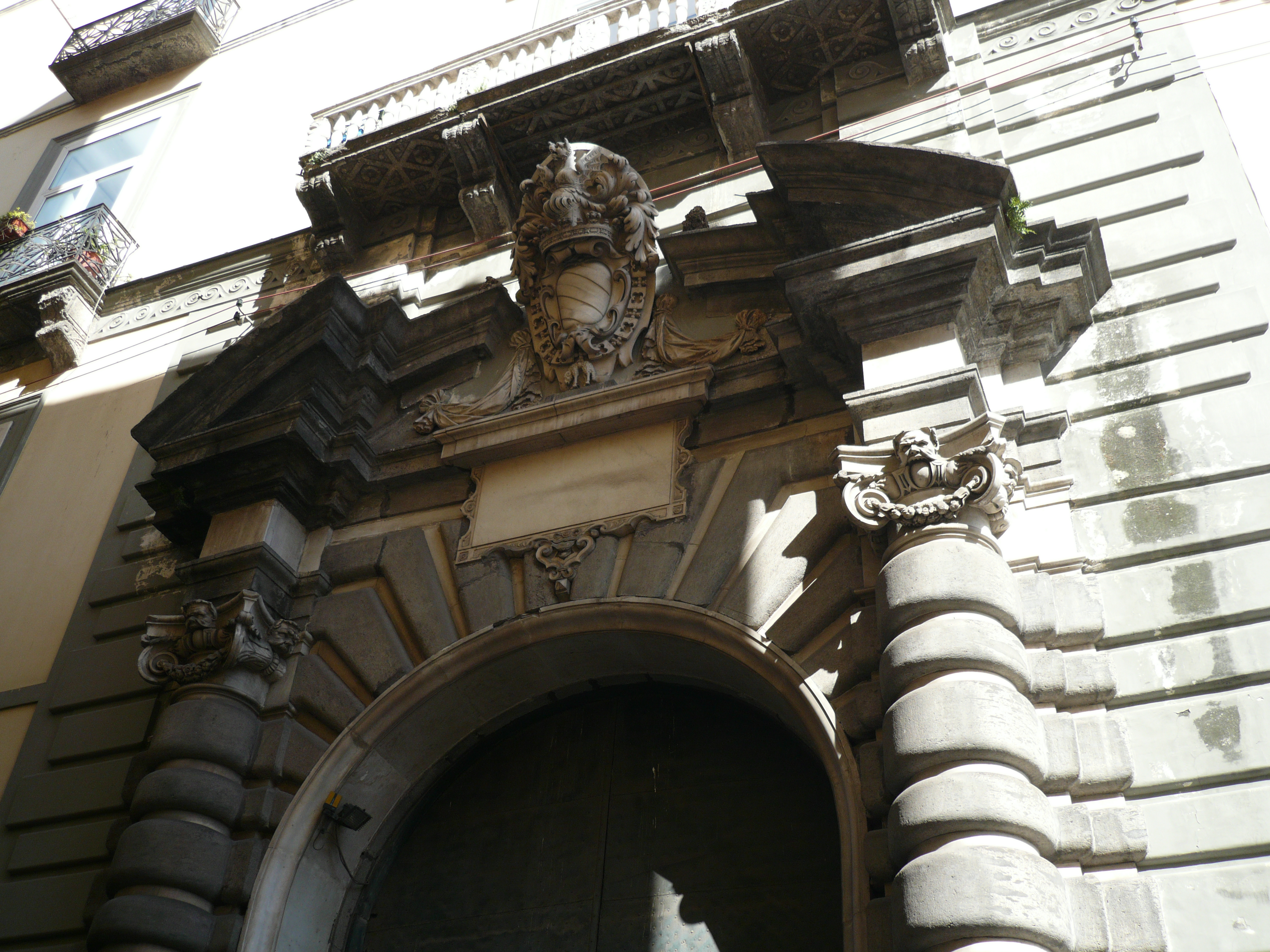 Decorazioni scultoree sull' ingresso del Palazzo di Sangro